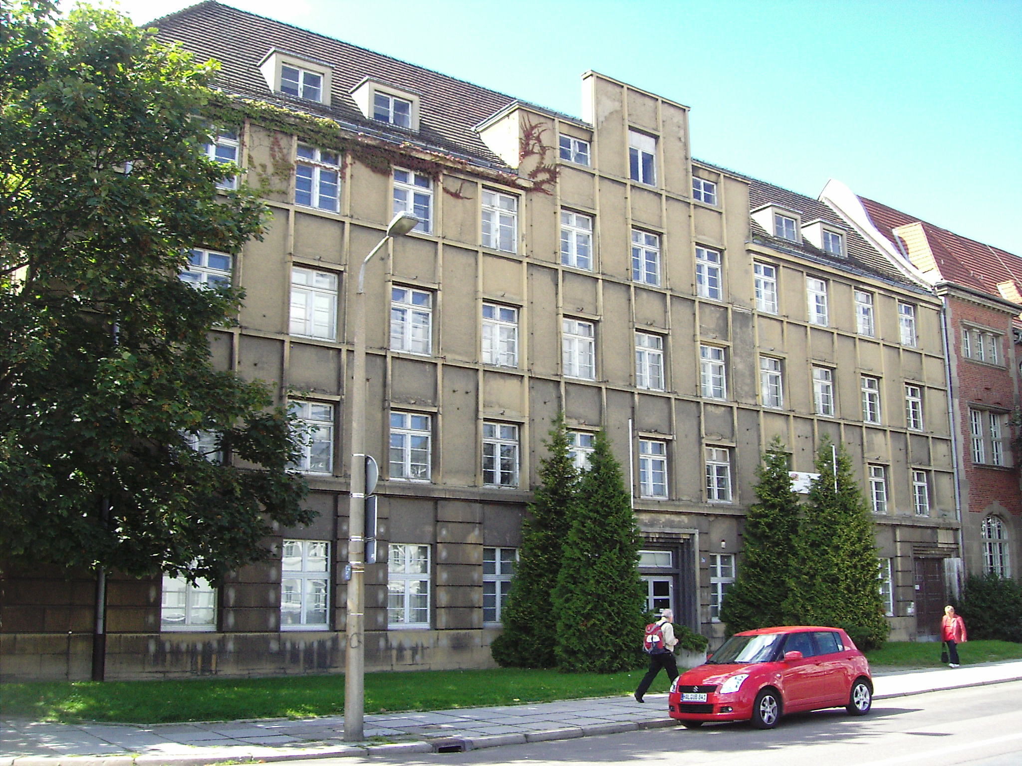 Gebäude des früheren Reichsbahnamtes Halle, Ernst-Kamieth-Straße 2A, 06112 Halle (Saale). Im Erdgeschoss befand sich auch die Reichsbahnsparkasse Halle (nachfolgend Sparda Bank), erbaut 1928/29 Wilhelm Freise